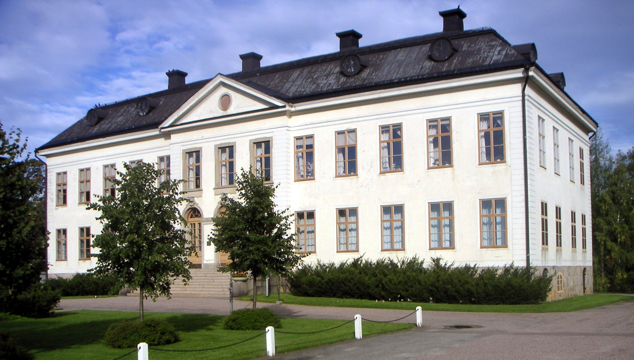 Skinnskattebergs herrgård - säte för Skogsmästarskolan